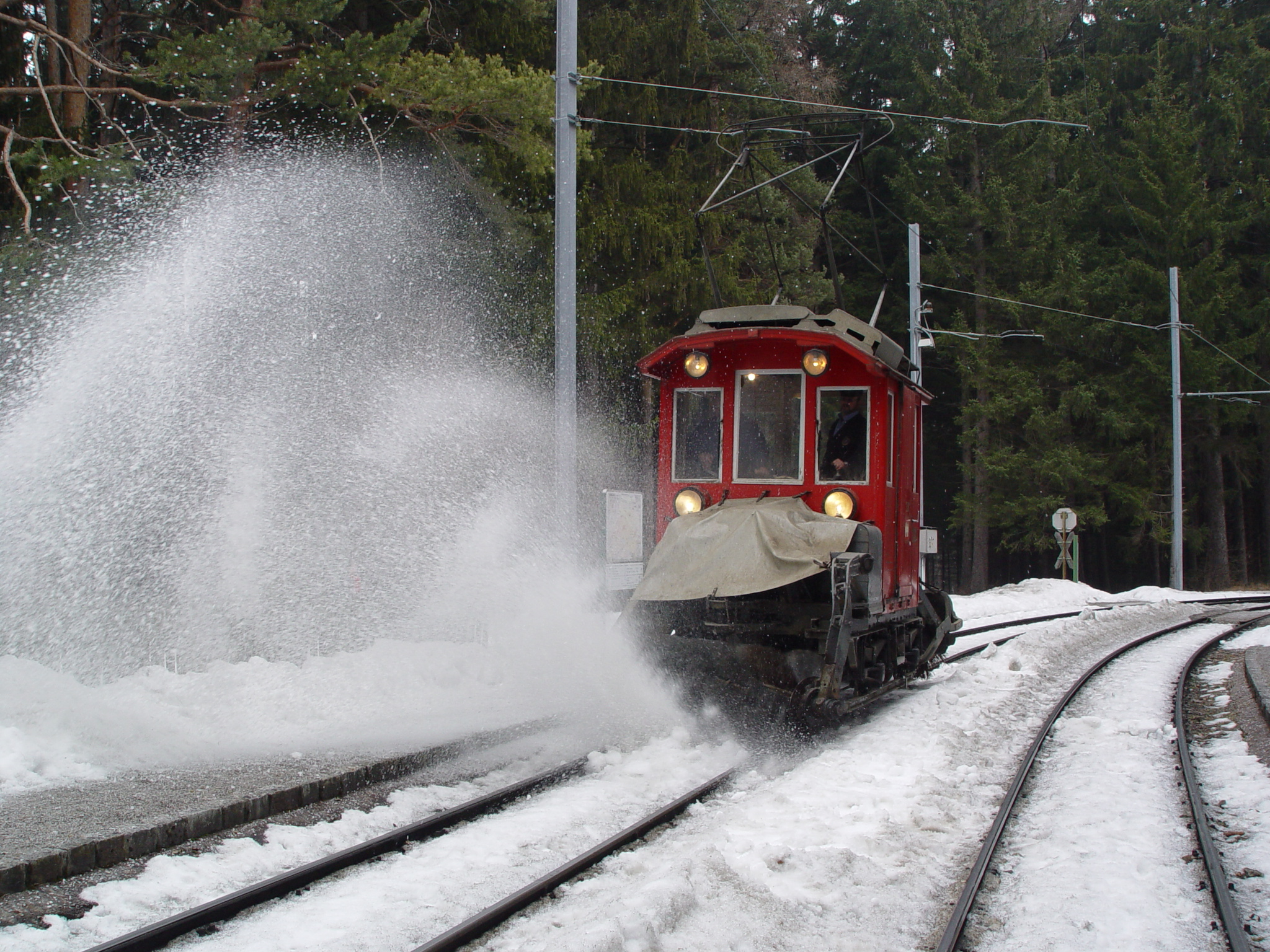 Schneekehre 200 der Straßenbahn Innsbruck auf der Innsbrucker Mittelgebirgsbahn